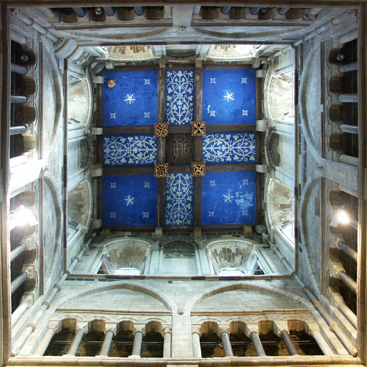 Wimborne Minster, Wimborne Minster, England